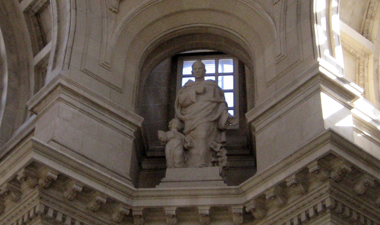 Escultura representando la Religión por Enric Casanovas, en el Palacio Nacional de Barcelona, Cataluña